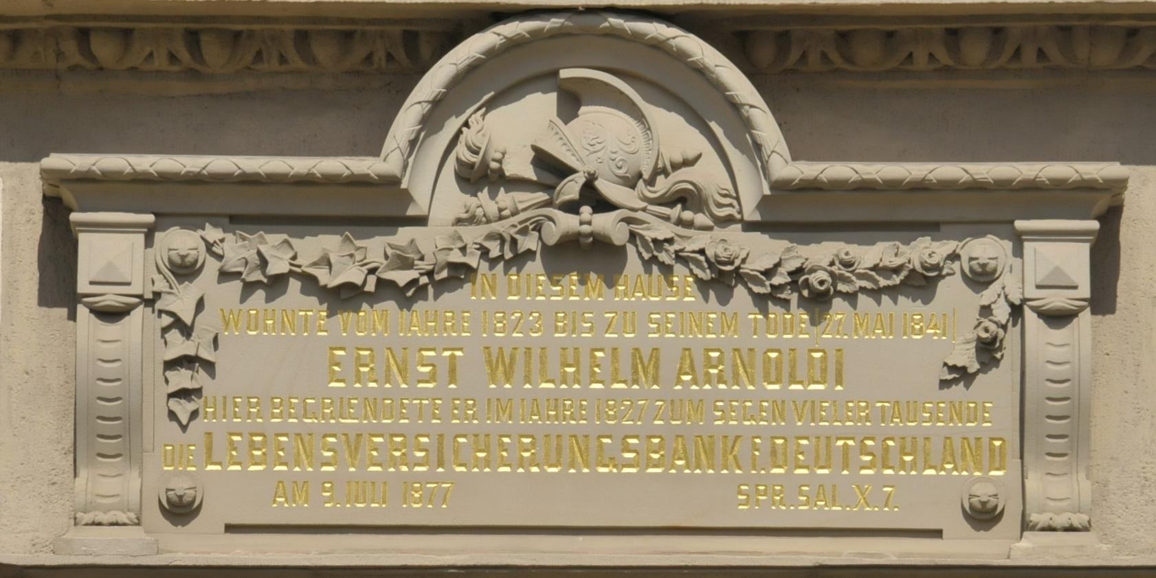 Gedenktafel am Wohn und Sterbehaus von Arnoldi am Hauptmarkt 14 in Gotha